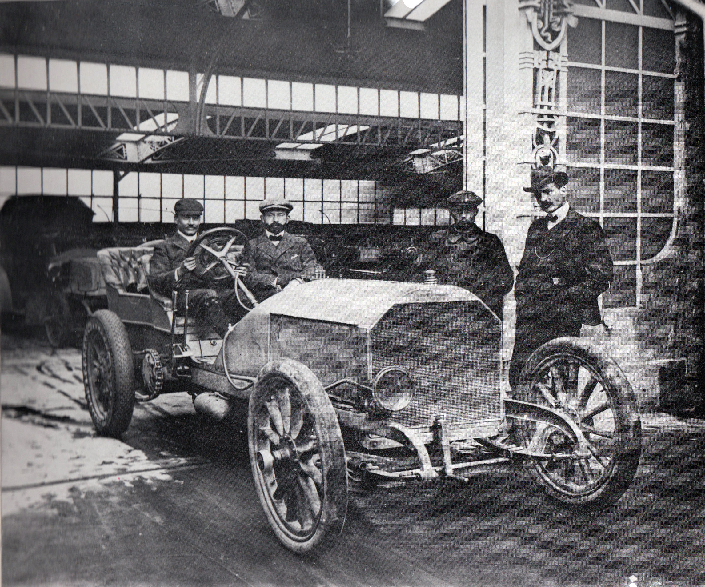 Lorenzo Ginori Lisci al volante di una Züst. La foto è stata scattata nell'officine Züst a Intra sul Lago Maggiore e il personaggio sull'estrema destra dovrebbe essere Roberto Züst